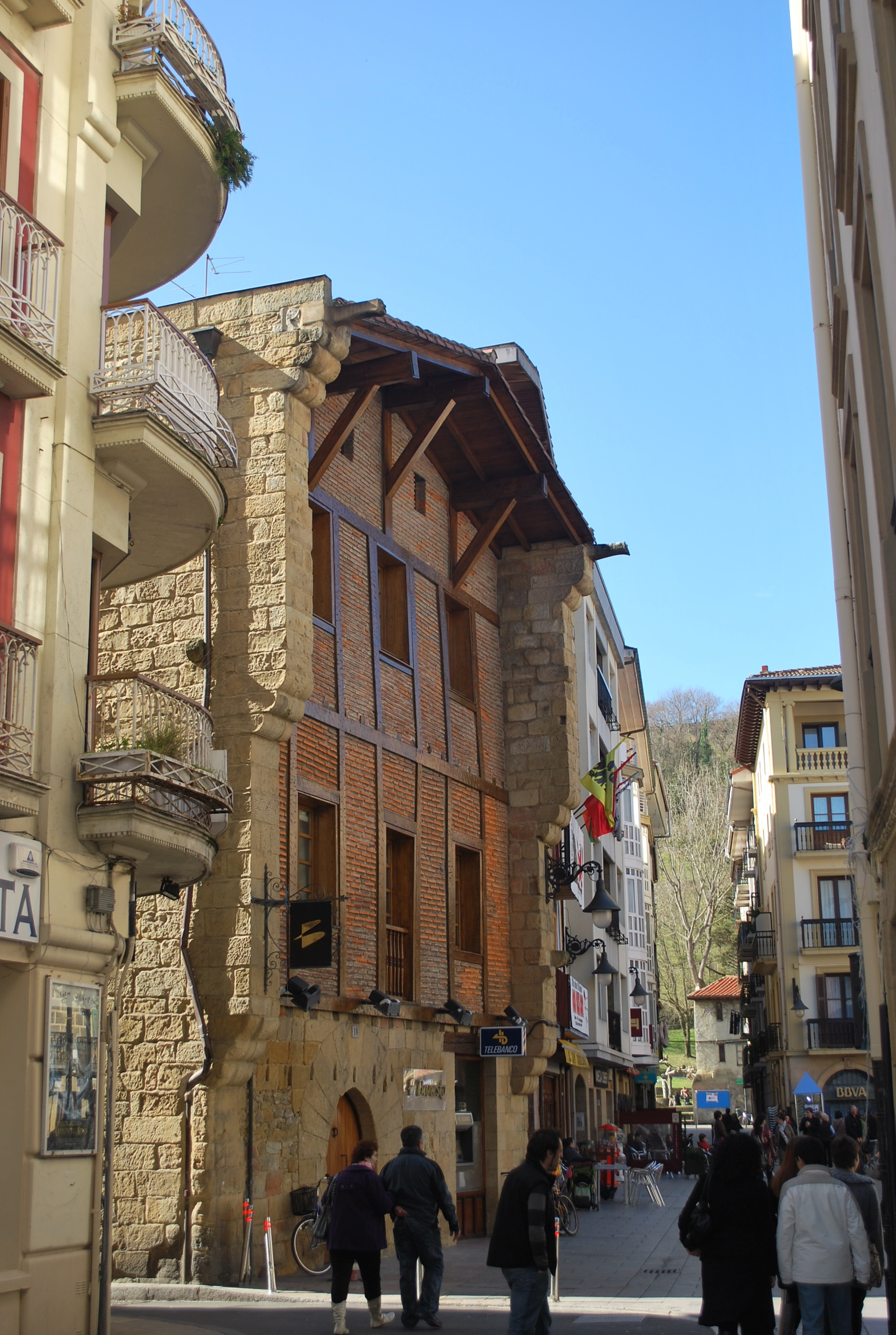 Maison en brique et colombage (Casa de Makazaga) à Zarautz (Guipuscoa).